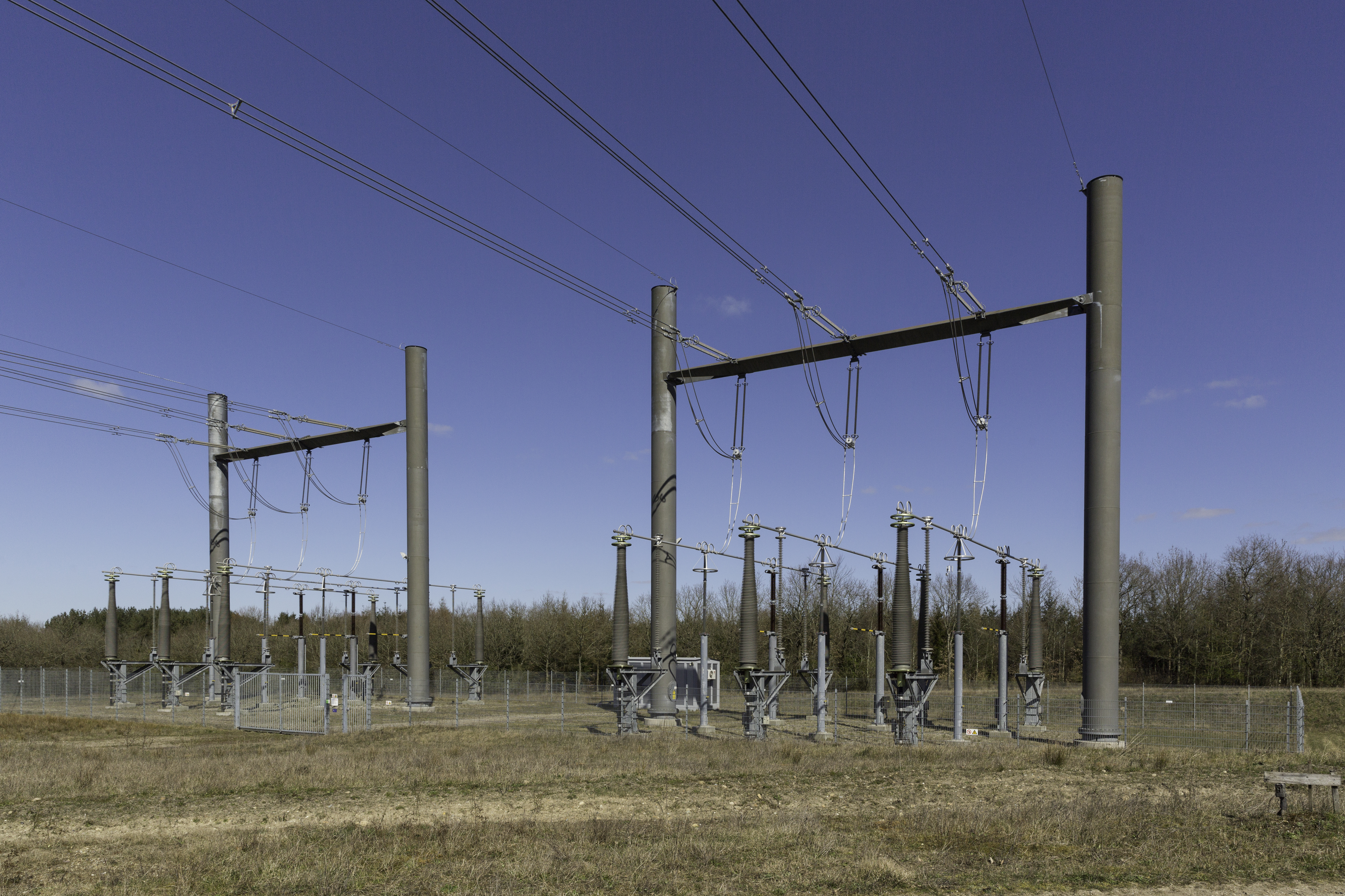 Højspændingsforbindelsen Kassø–Tjele: Forbindelsen mellem luftledninger og jordkabler sker via denne overgangsstation ved sydvestsiden af Bølling Sø ved Engesvang